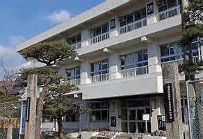 校舎の正面外観。